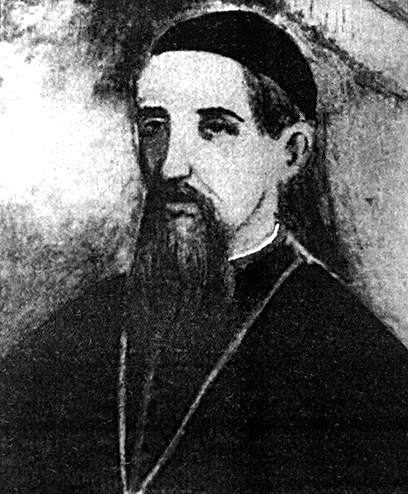 Obispo dominico fray Justo Alfonso Aguilar Rueda, vestido a la costumbre china.